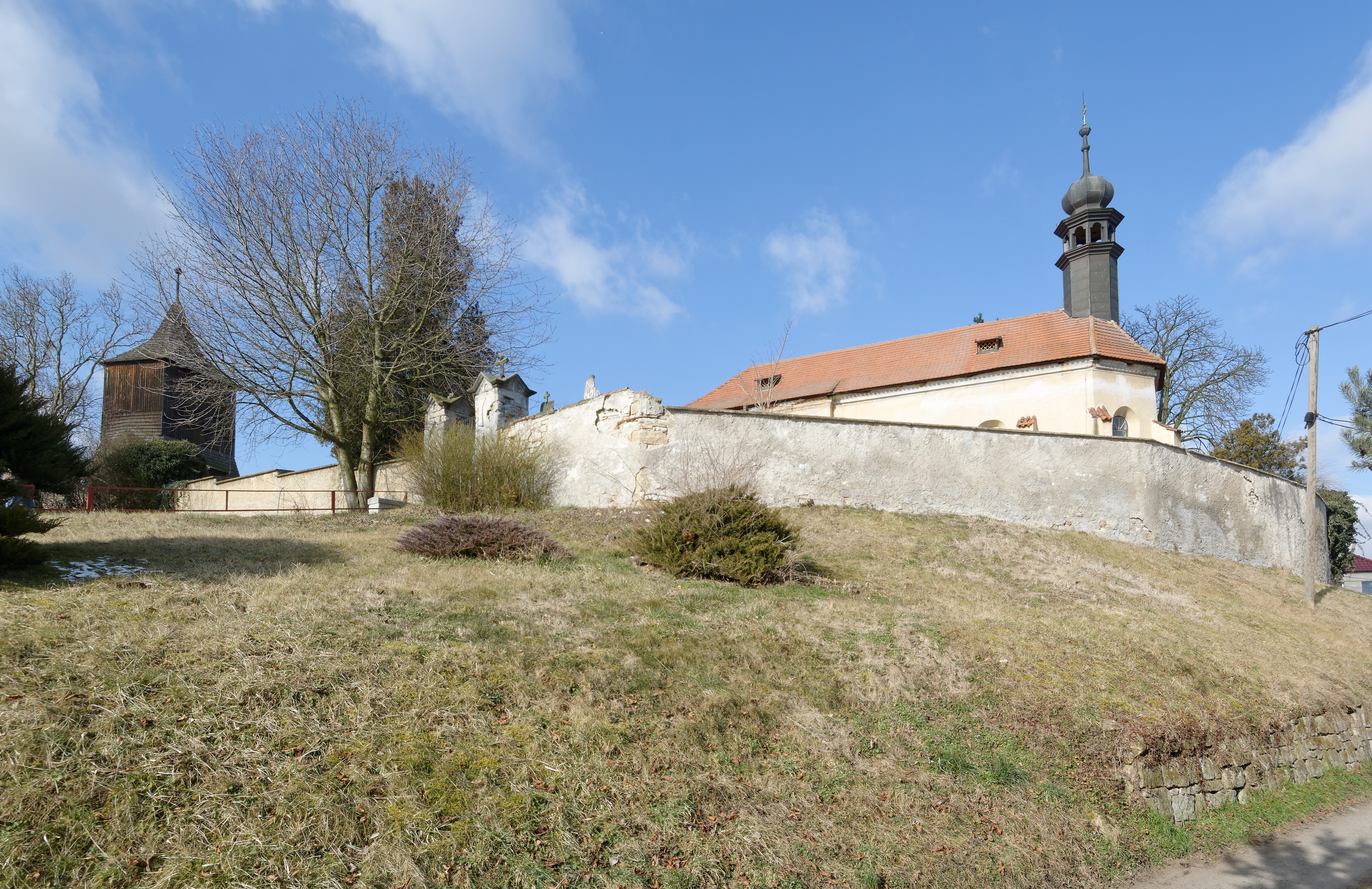 Kostel svatého Petra a Pavla v Přelíci. Pohled na areál od jihovýchodu.